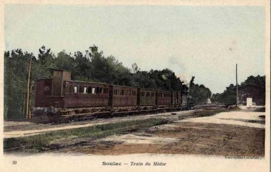 Carte postal du train à Soulac